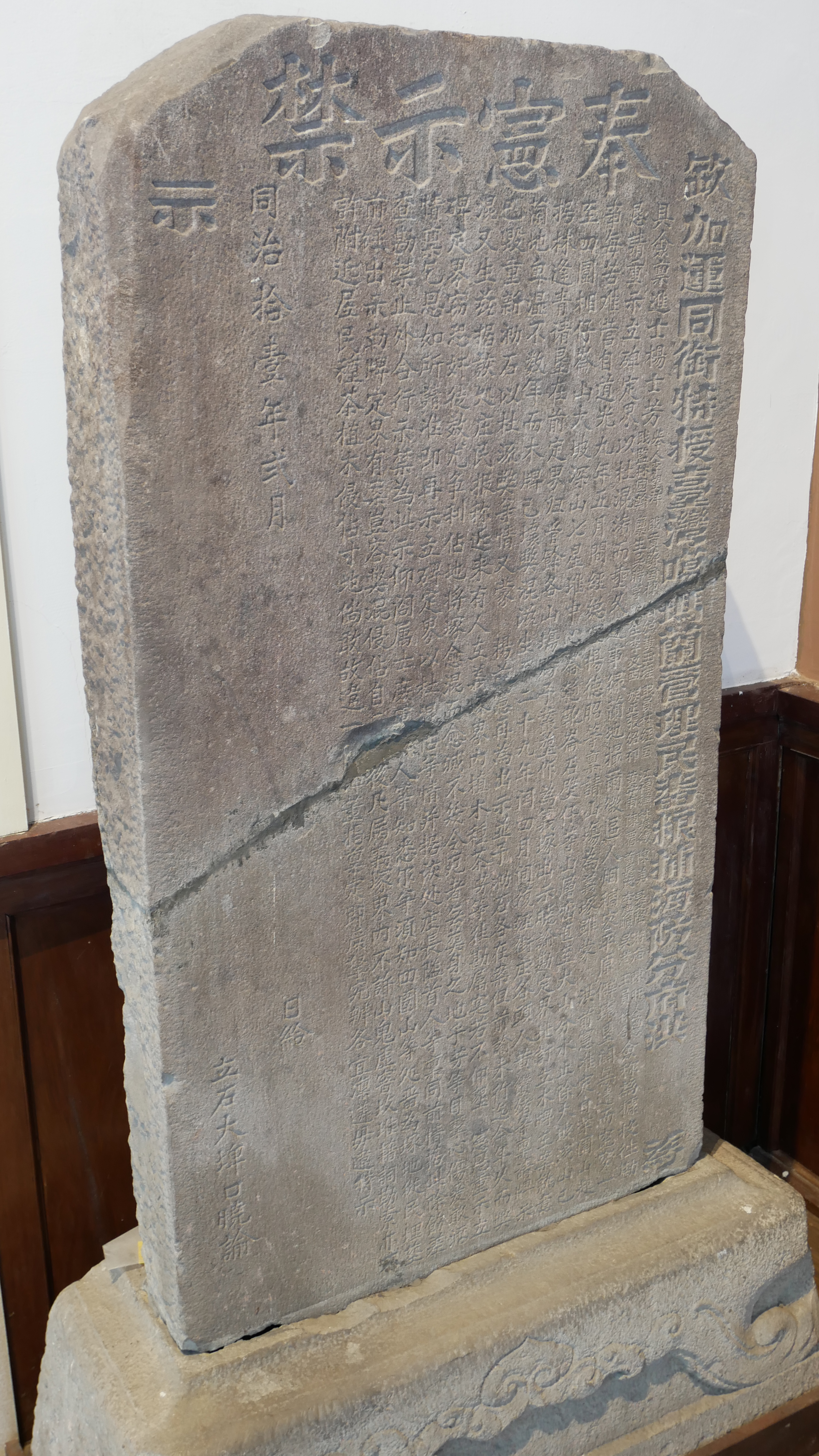 中文（台灣）: 嚴禁侵占柴圍山等處義塚碑記（同治拾壹年貳月），臺北市大安區學府次分區學府里